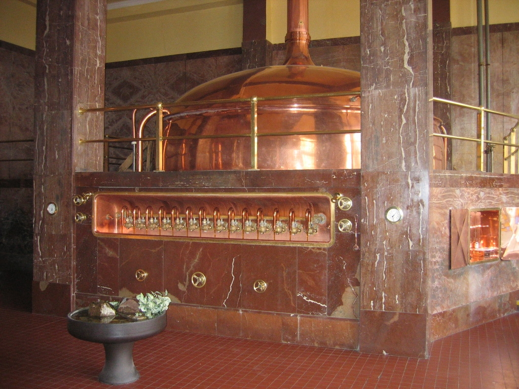 Fotografie z exkurze pivovaru Litovel.